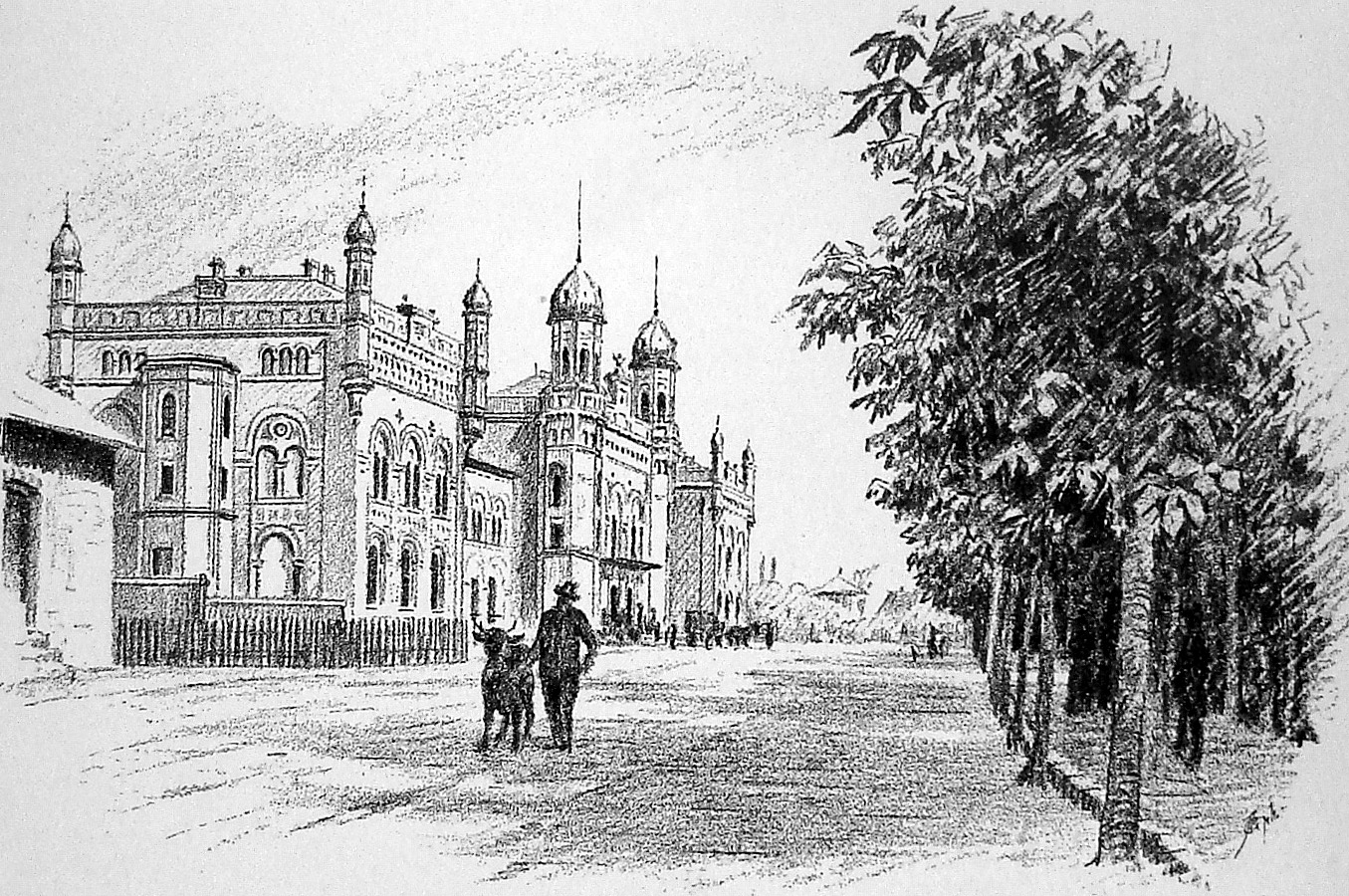 Odense Banegård 1865-1914